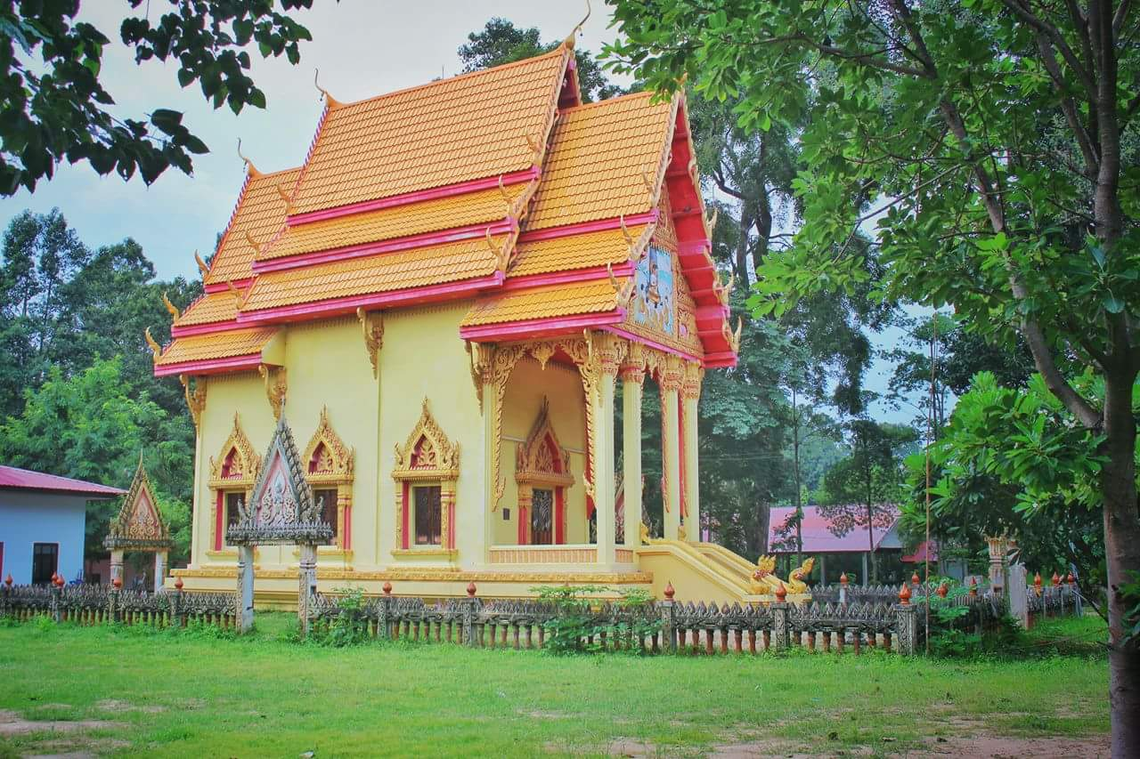 พระอุโบสถวัดตรีสุวรรณาราม บ้านซำ อ.มหาชนะชัย จ.ยโสธร